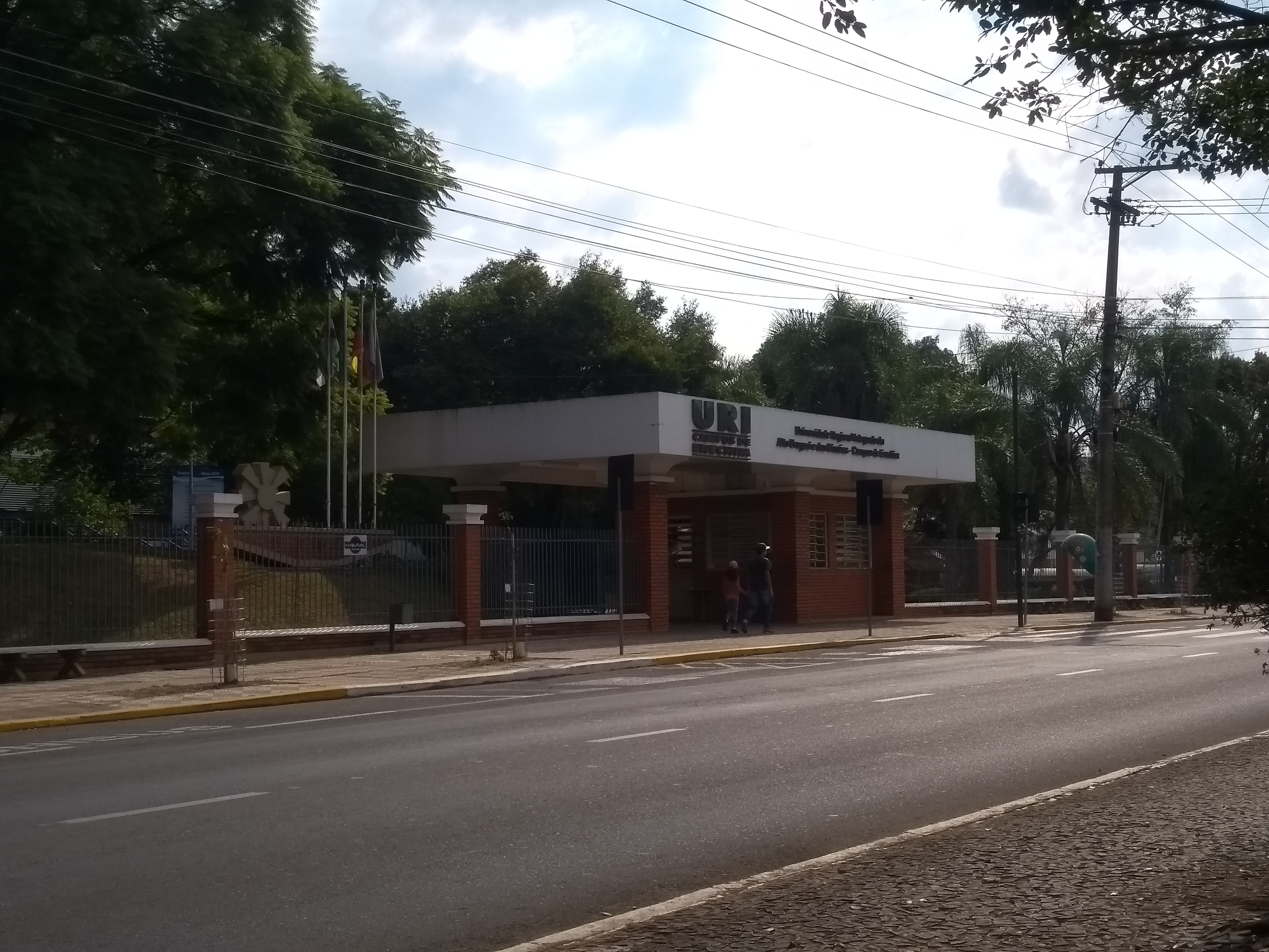 Fachada da URI Erechim, Erechim, Brasil